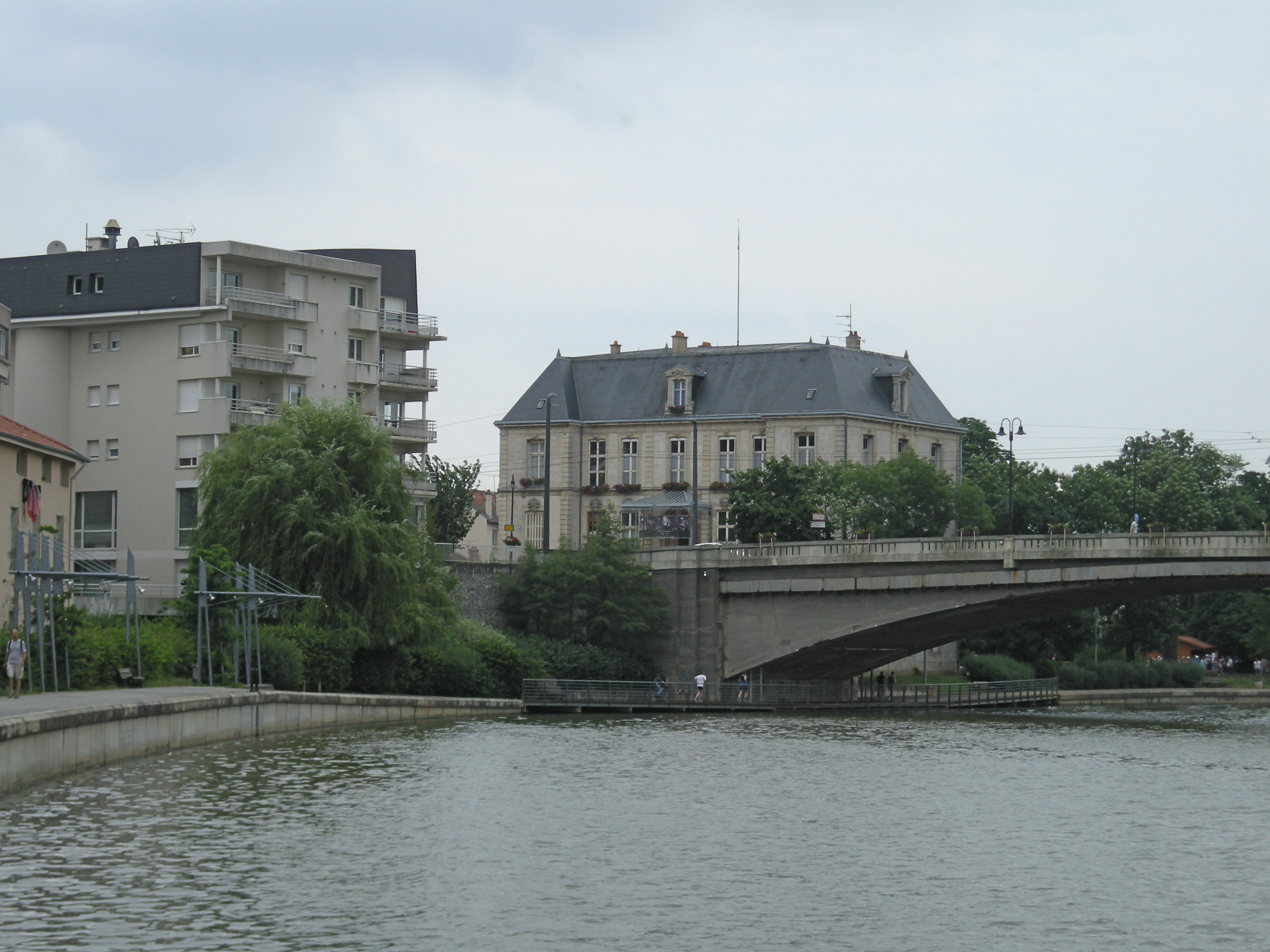 Le château et le pont sur la Meurthe à Saint-Max (Meurthe-et-Moselle)